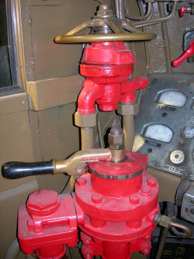 Particolare del freno tipo Westinghouse e del moderabile di una locomotiva E.424